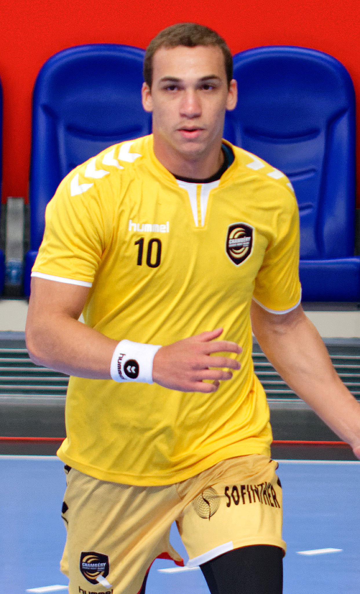 Rencontre de championnat de LidlStarLigue entre le PSG et chambéry. A coubertin, le 15 mars 2017.